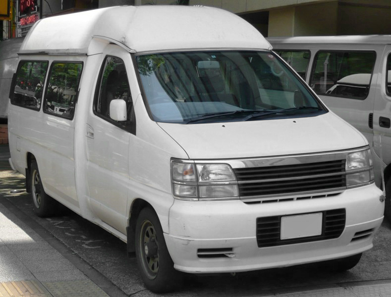 Nissan Elgrand jumbotaxi.